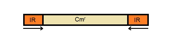 Minitransposooni ehitus